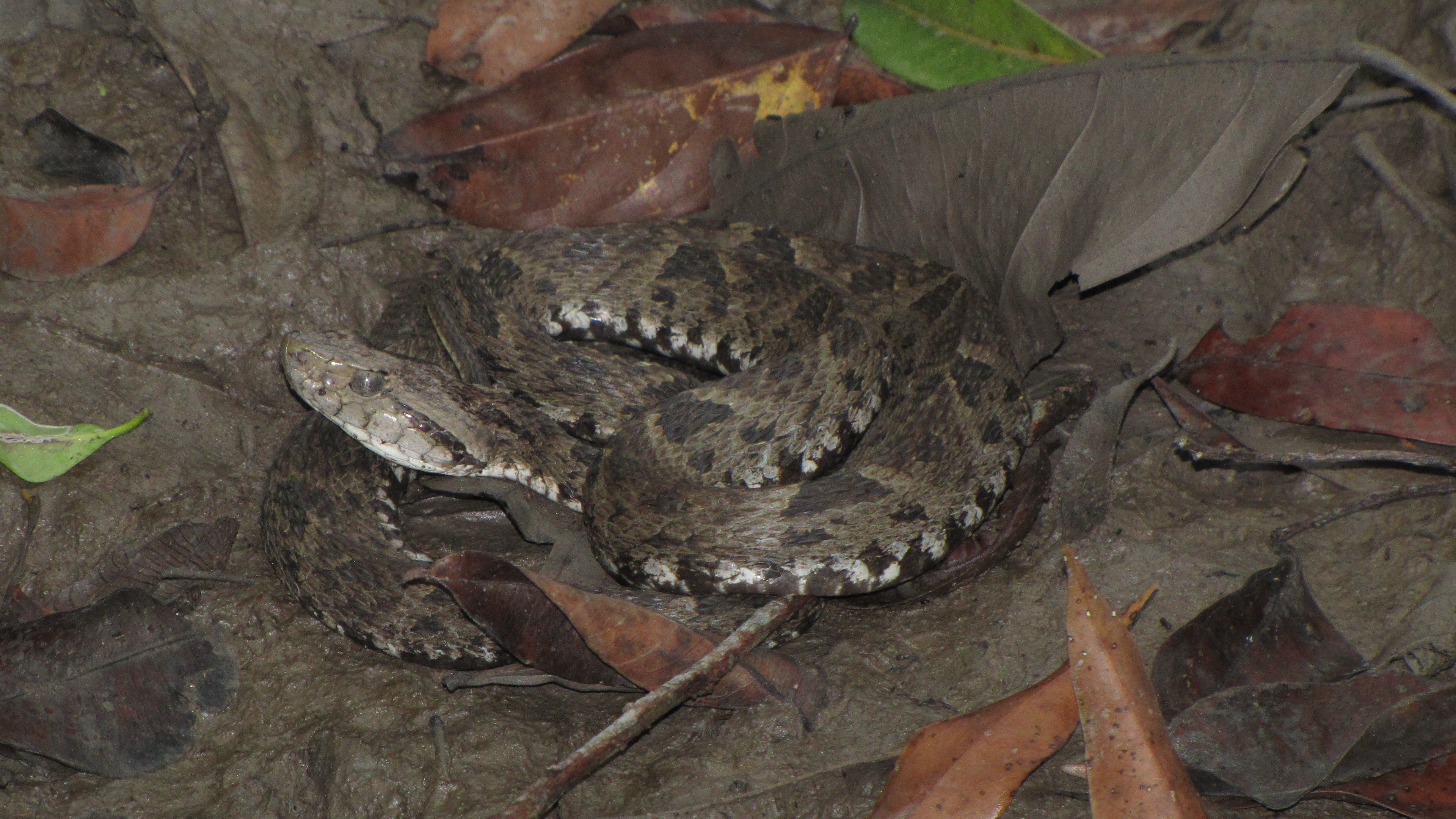 Víbora conocida como talla X o mapaná. Magdalena medio, Colombia